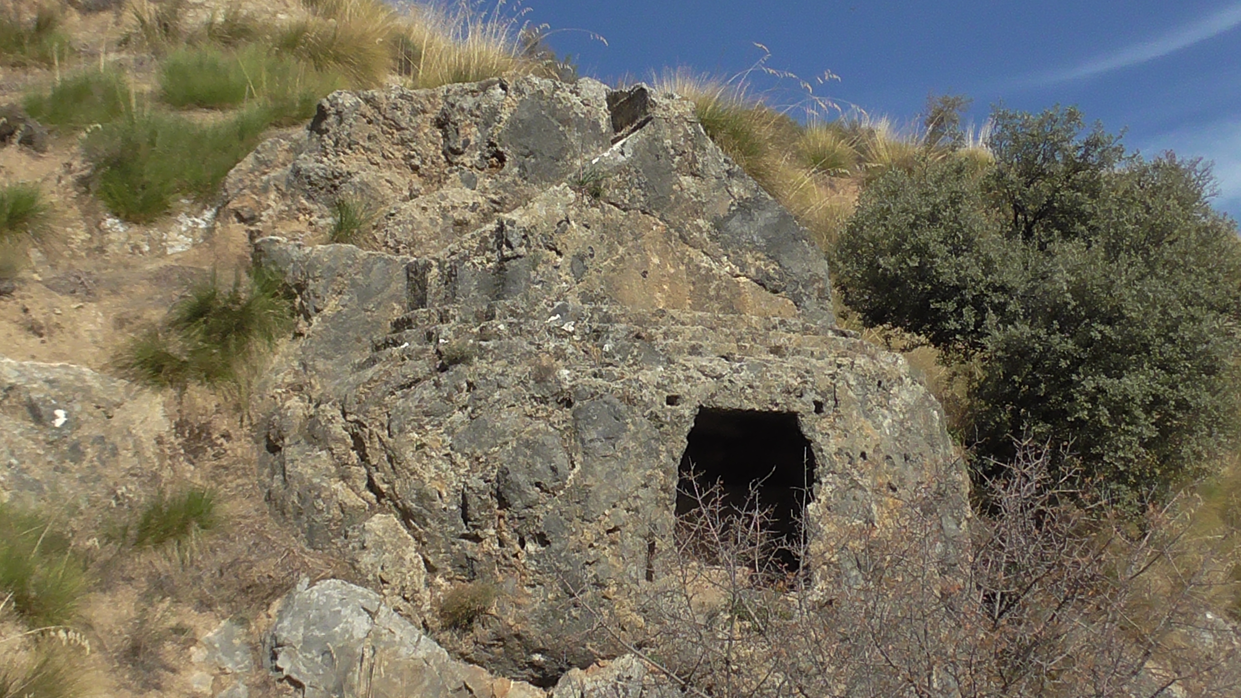 monument archéologique romain